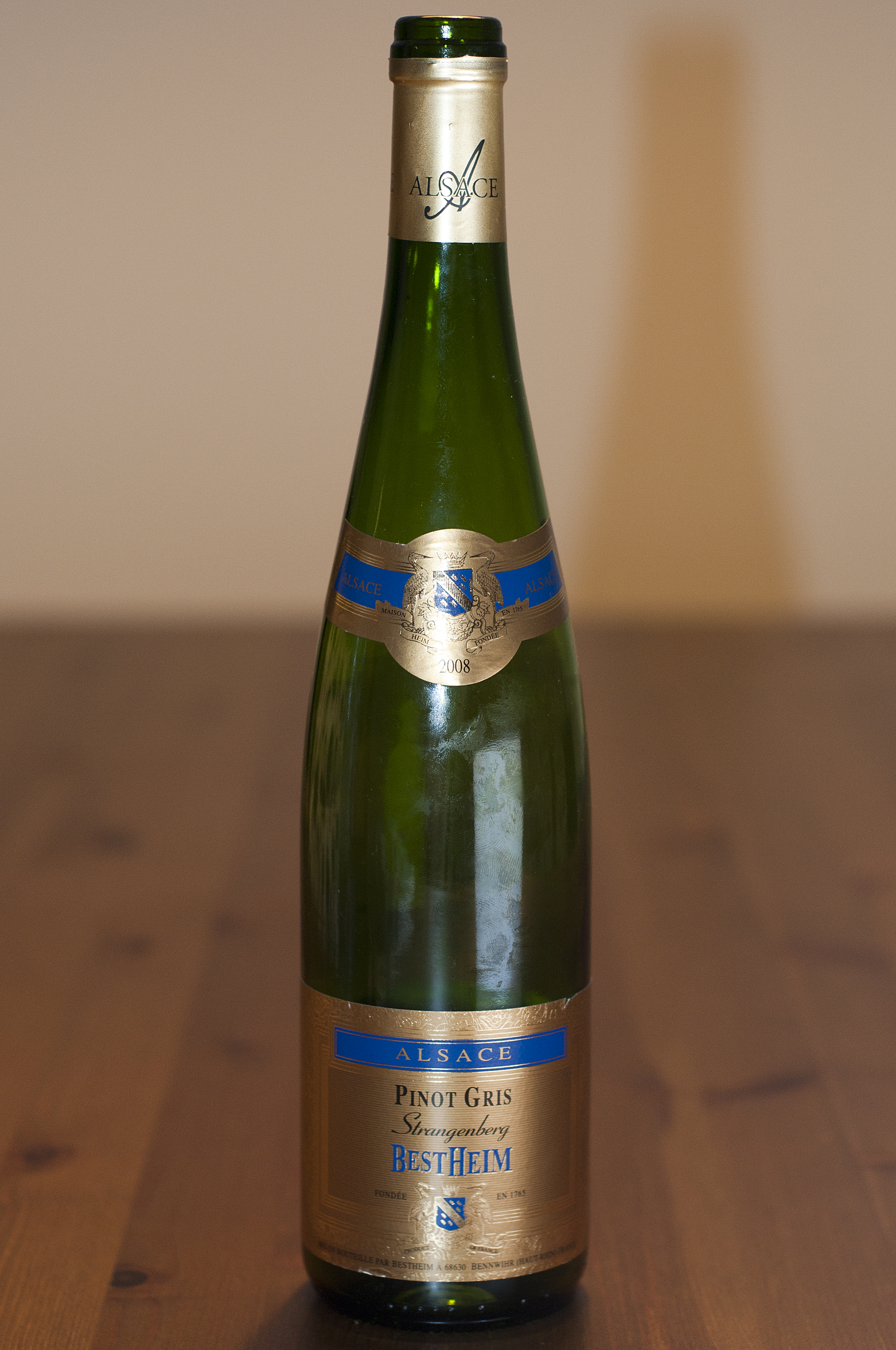 2008 Strangenberg Bestheim pinot gris from Alsace